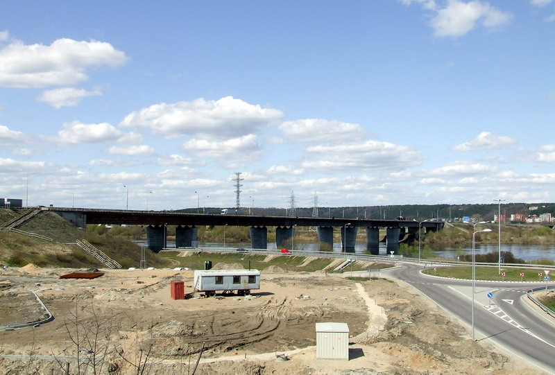 Lampėdžių tiltas.